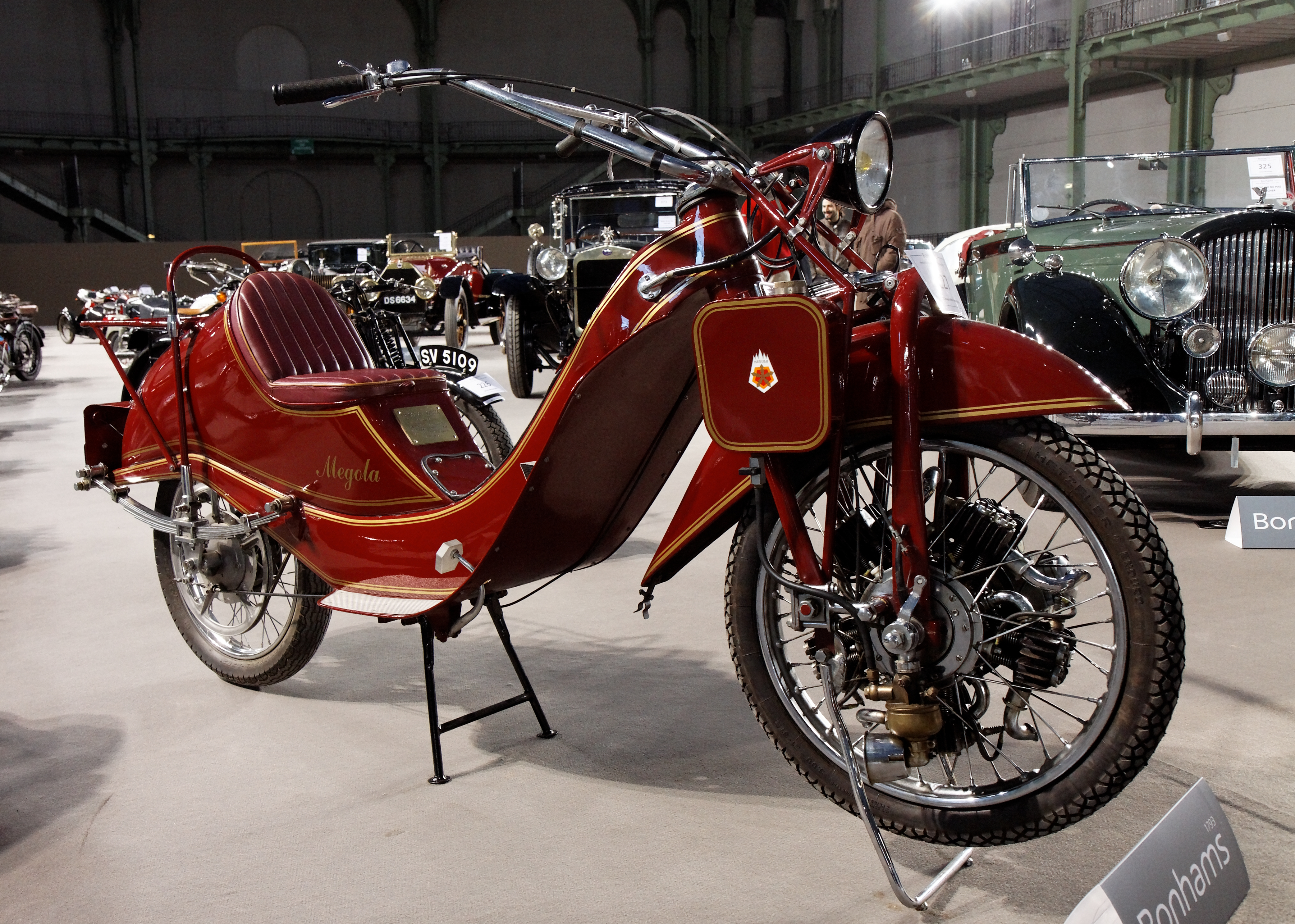 Megola 640cc Touring Model